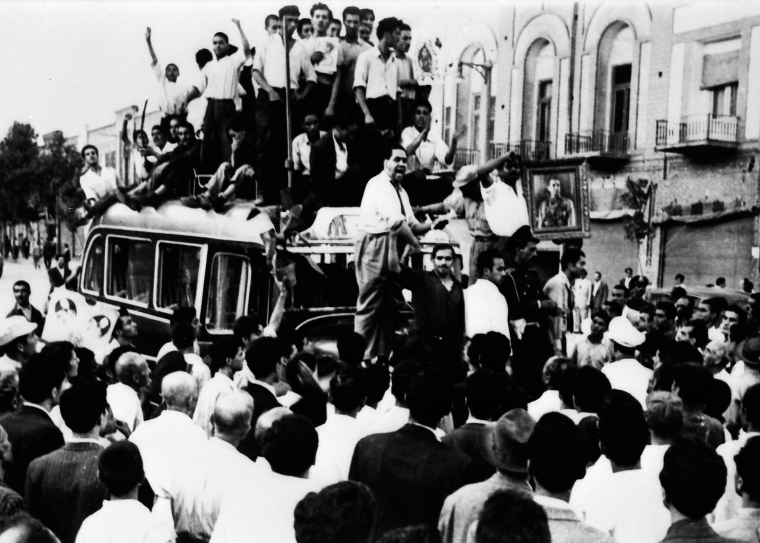 28 مرداد 1332، 9 صبح: طرفداران شاه در صبح روز کودتا. برای به خیابان کشیدن مردم به آنها گفته شده بود که روز گذشته، شاه با قلبی اندوهگین به خانه رفته.